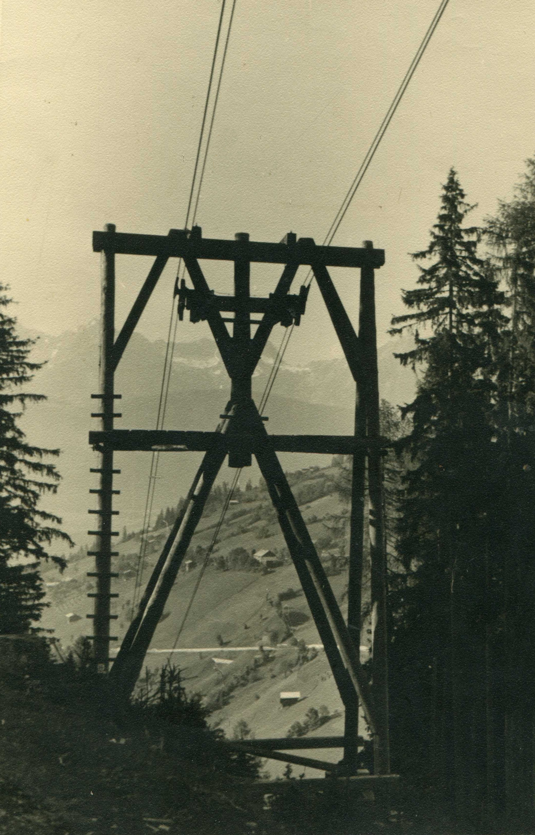 Seilbahn Fritzens Walchen 1940 - 1951. Eine Stütze der Seilbahn am Vögelsberg.